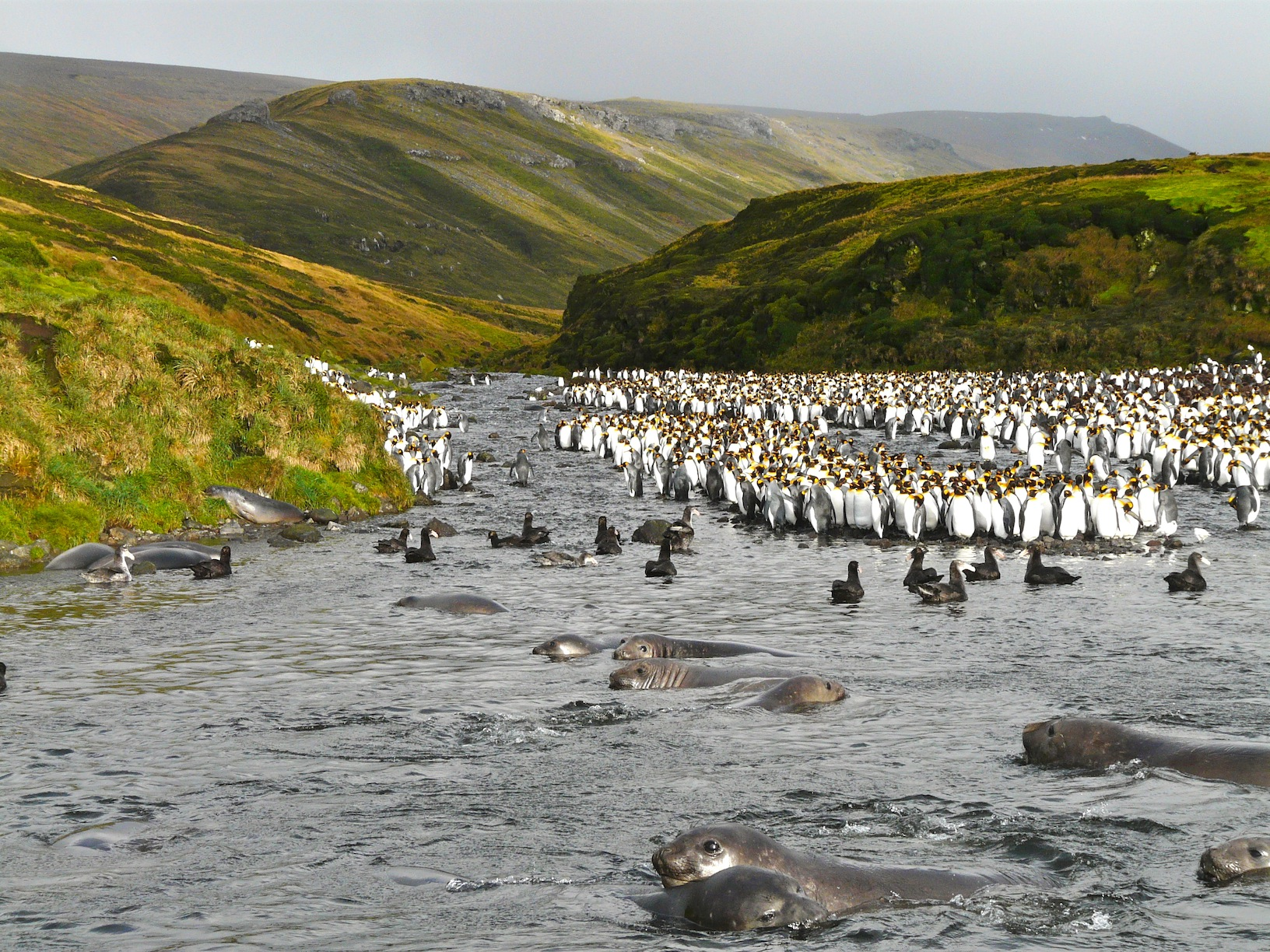 Swimming pool